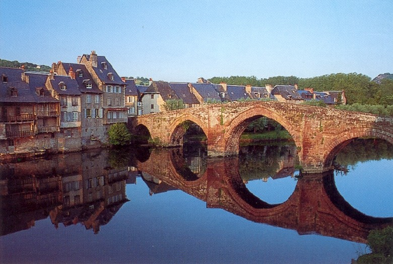 Espalion (Aveyron, Midi-Pyrénées, France) : Le Pont-Vieux sur l'Olt.